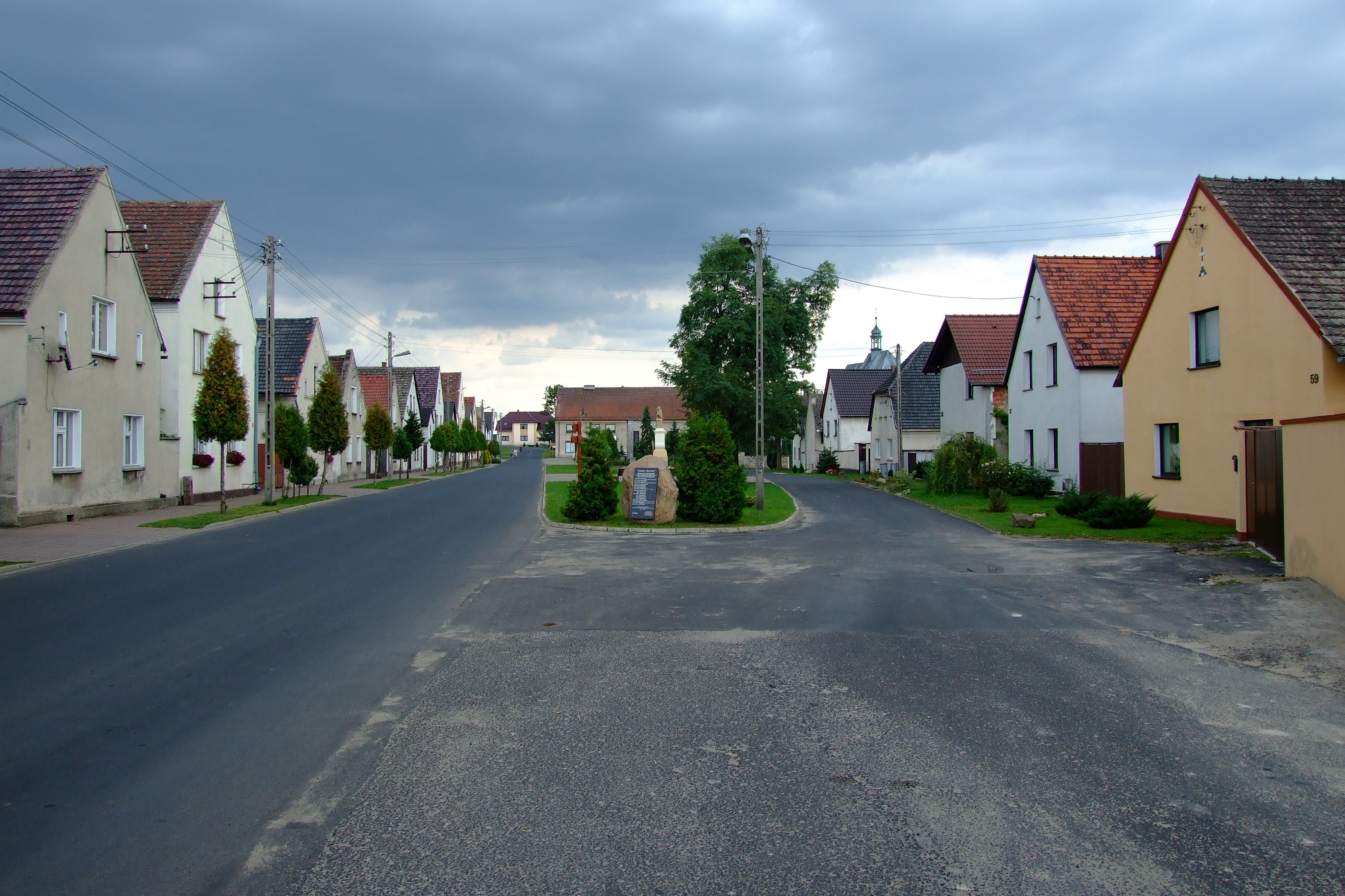 Rynek w Jemielnicy - układ przestrzenny wsi figuruje jako zabytek w Rejestrze Zabytków